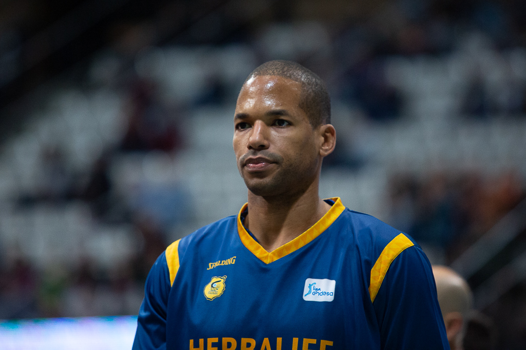 Eulis Báez, jugador del Herbalife Gran Canaria en partido de liga contra el Divina Seguros Joventut en el Olímpic de Badalona.